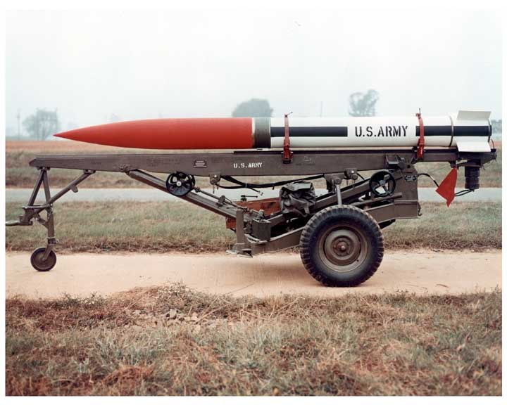 MGR-3 Little John (XM51)